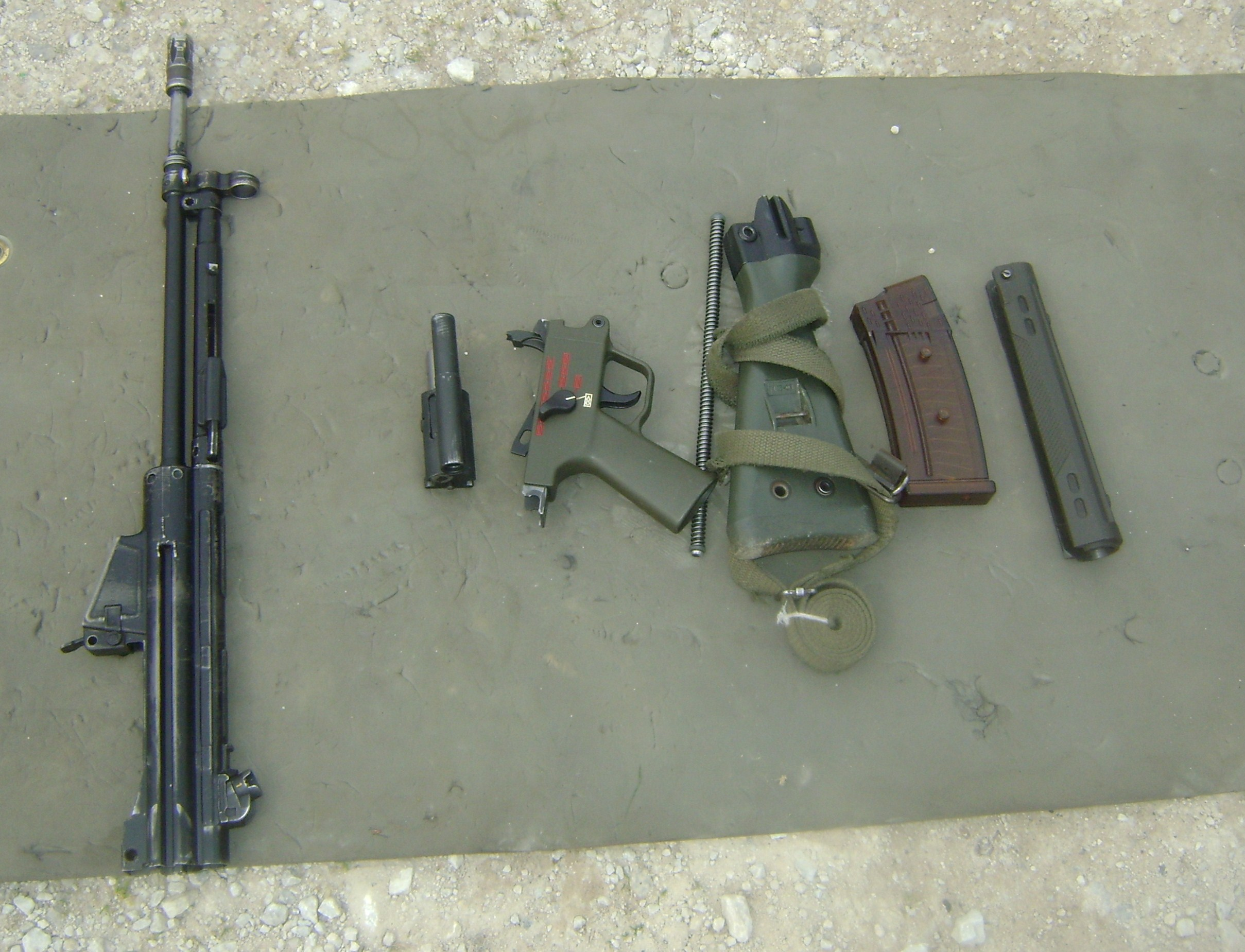 Türkisches HK33 auseinandergenommen